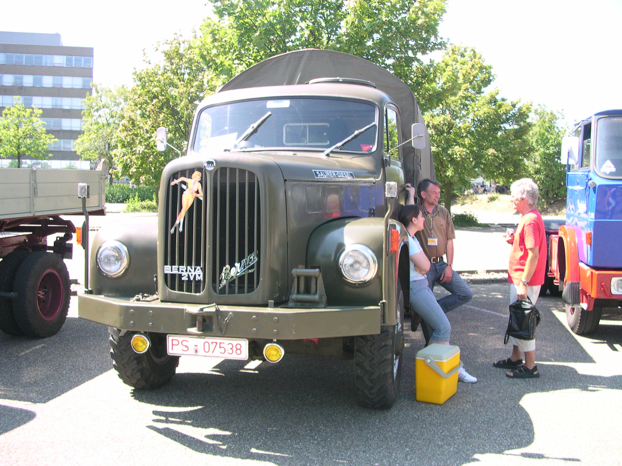 großes Oldtimertreffen im Mercedes-Werk in Wörth am Rhein 2006, Militärfahrzeuge